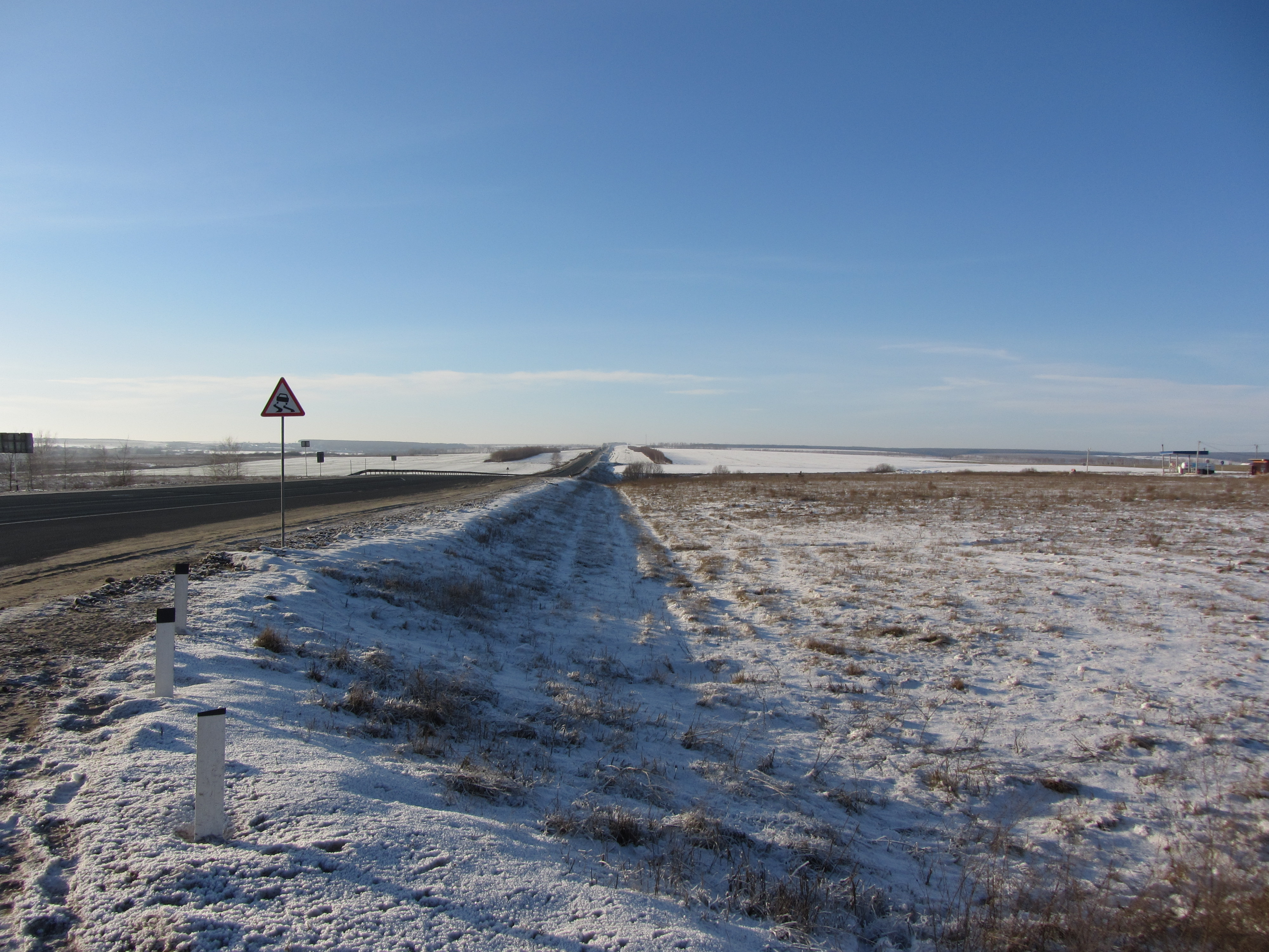 P178 близ с.Дубёнки